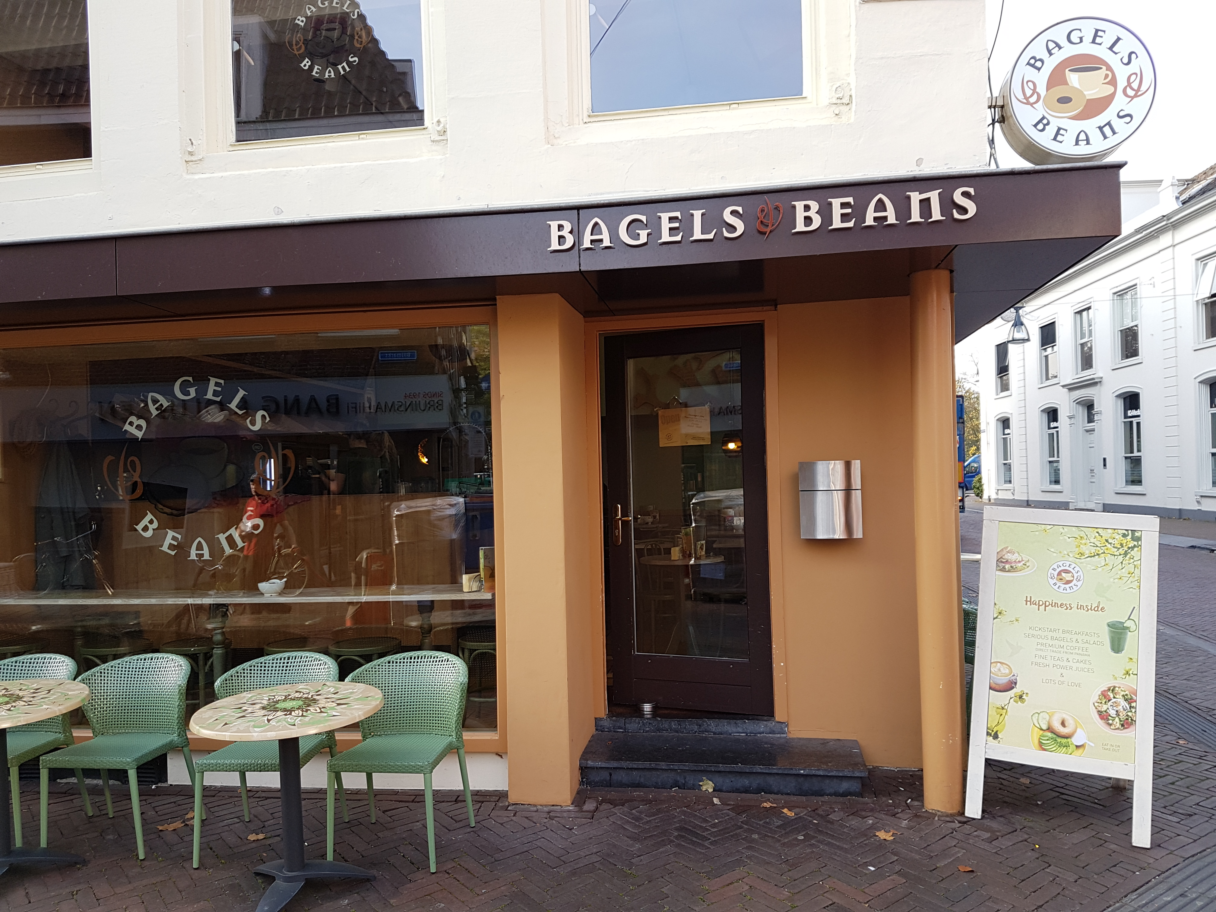 Filiale von Bagels and Beans in Zwolle